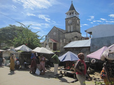 Centre ville Ambilobe. Eglise